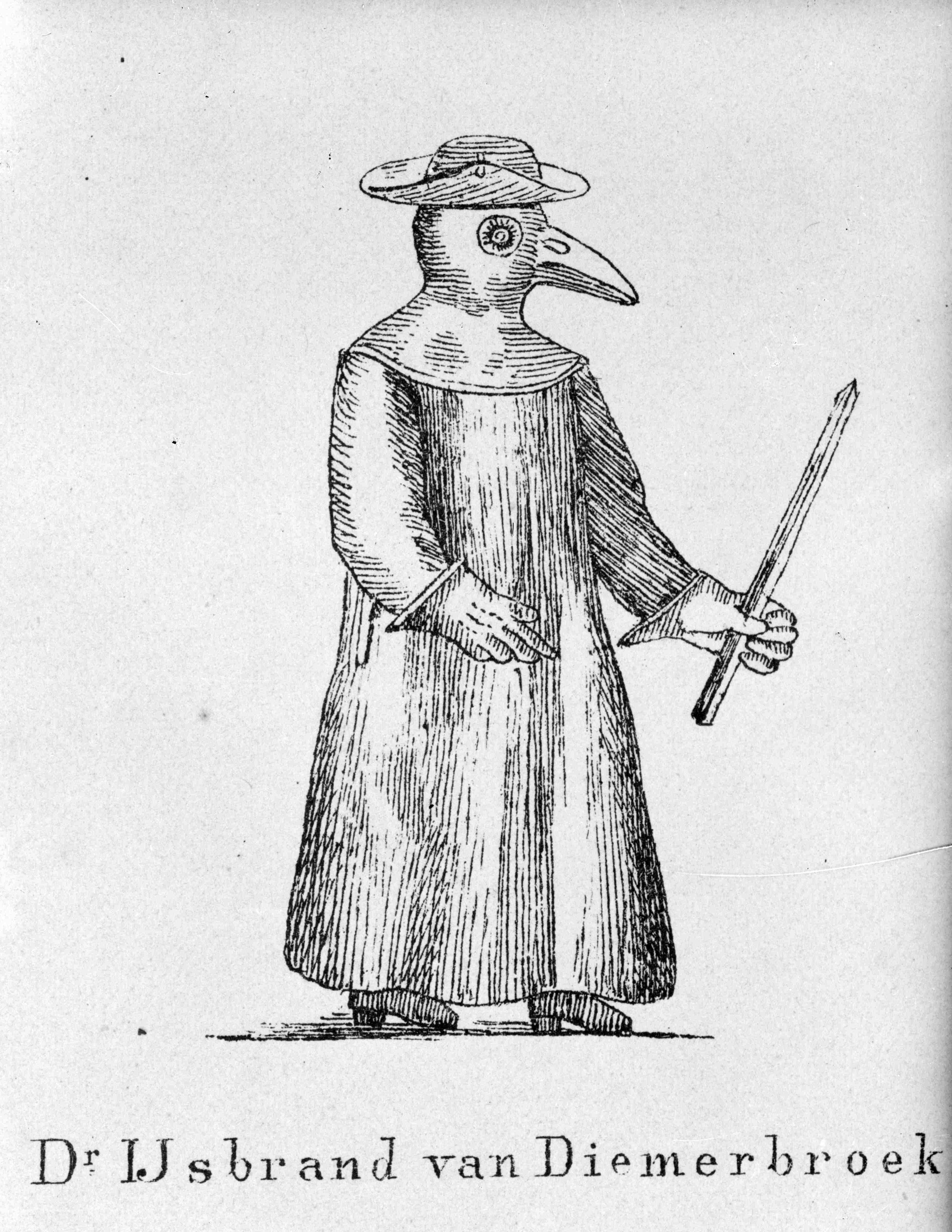 Personen: Dr. IJsbrand van Diemerbroeck (Pestdokter)